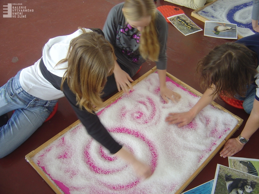 Zážitkové programy pro školy v krajské galerii ve Zlíně